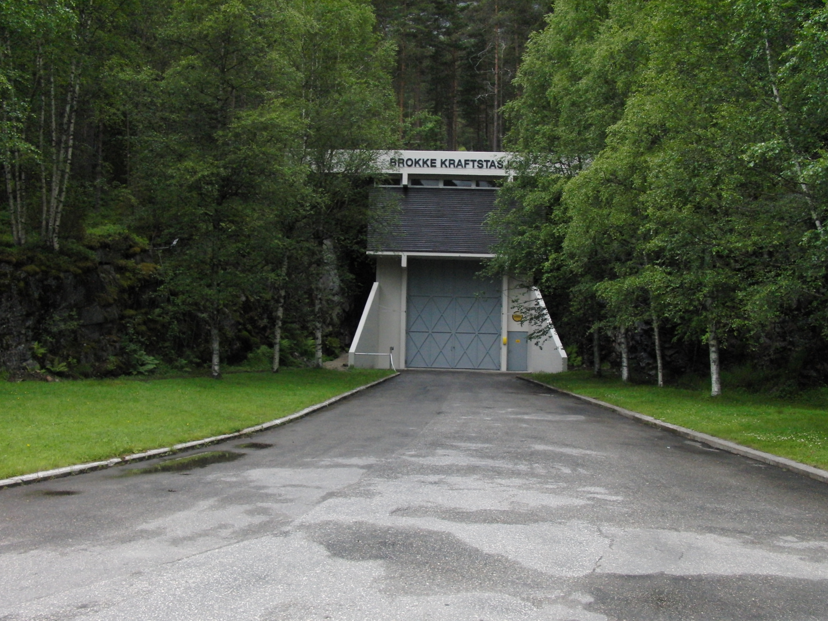 Brokke kraftstasjon inngangsportal